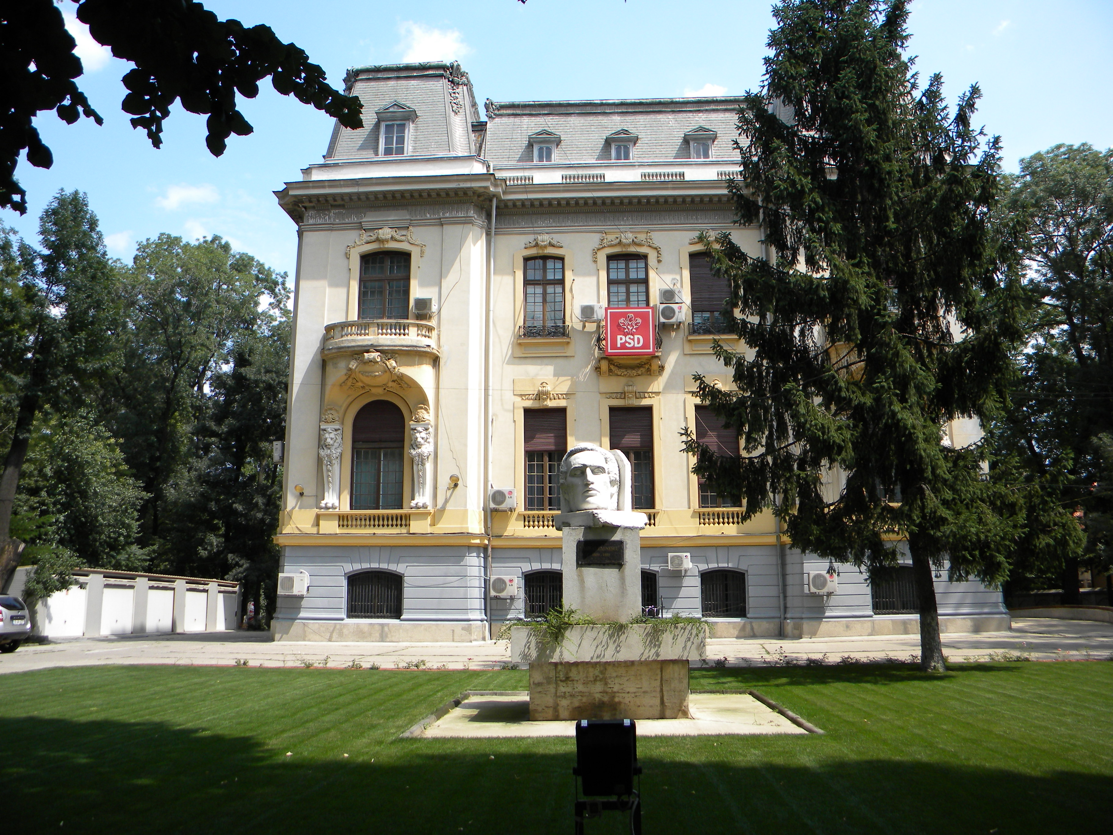 Casa Toma Stelian, Sos. Kiseleff nr. 10, Bucuresti, sect. 1